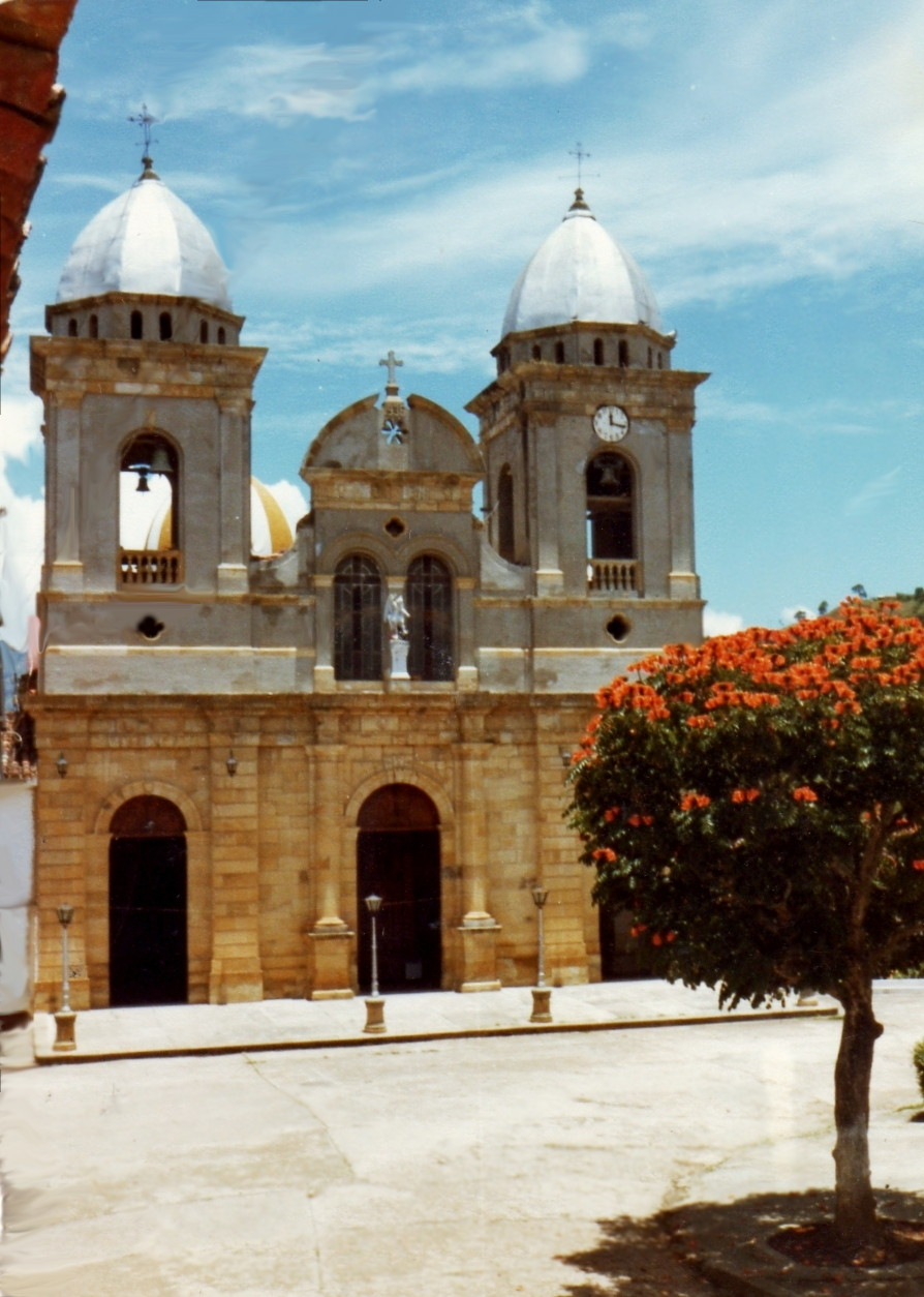 TENZA